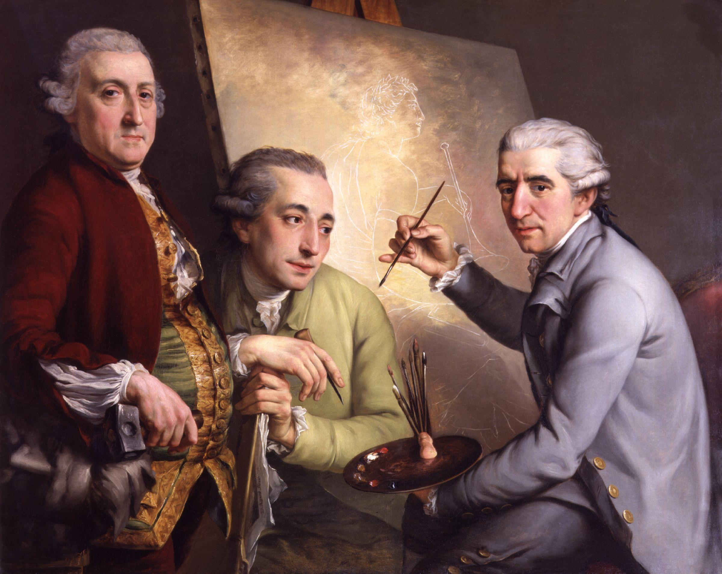 Portrait of Agostino Carlini; Francesco Bartolozzi; Giovanni Battista Cipriani